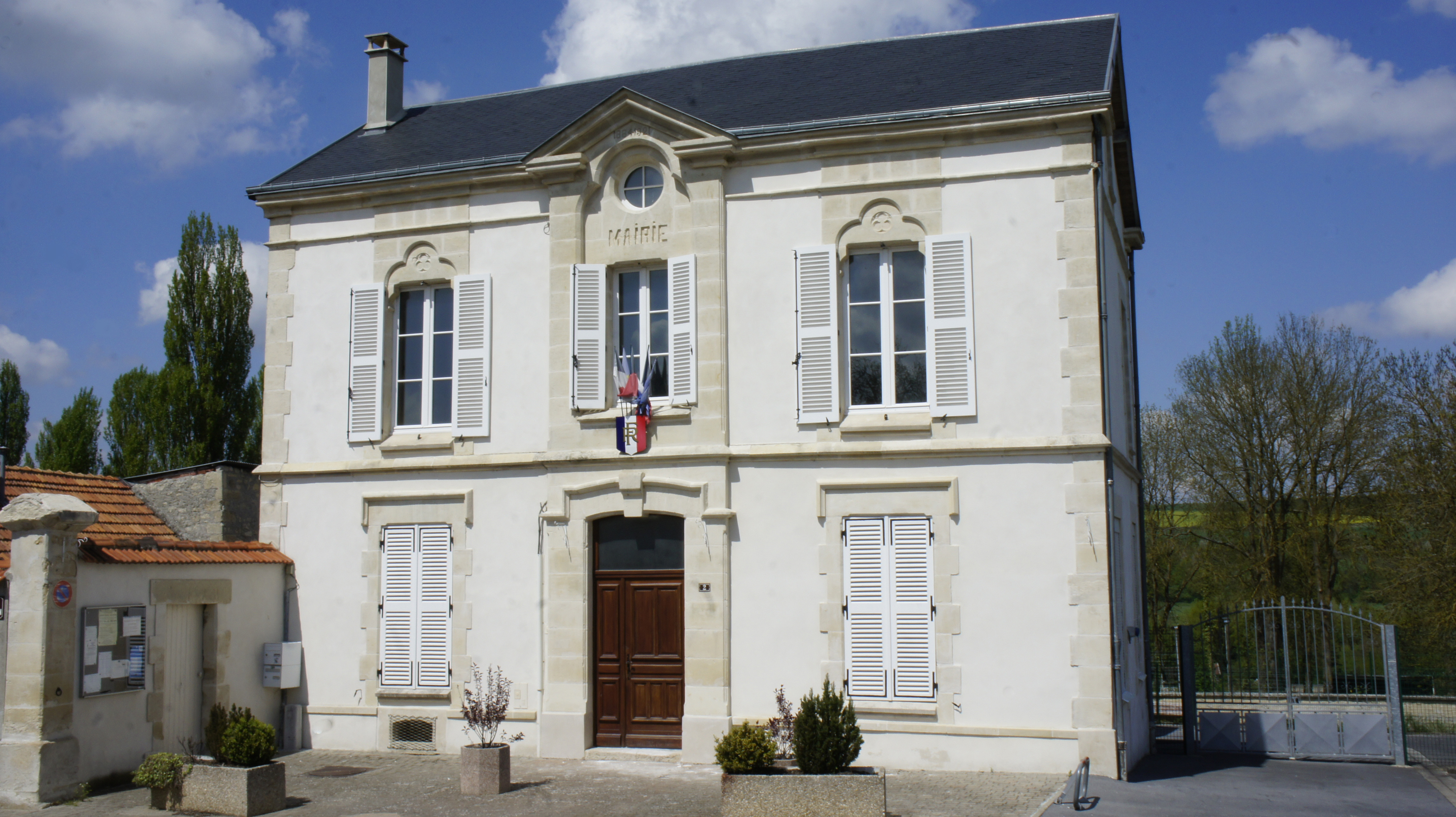 Mairie de Magneux .